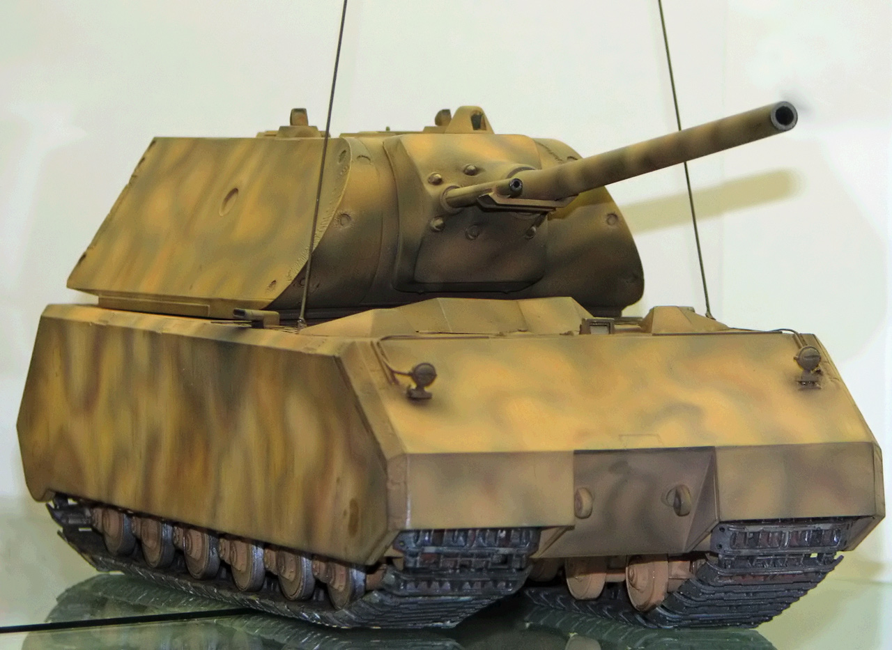 Dieses Bild zeigt ein Modell des Panzers "Maus".